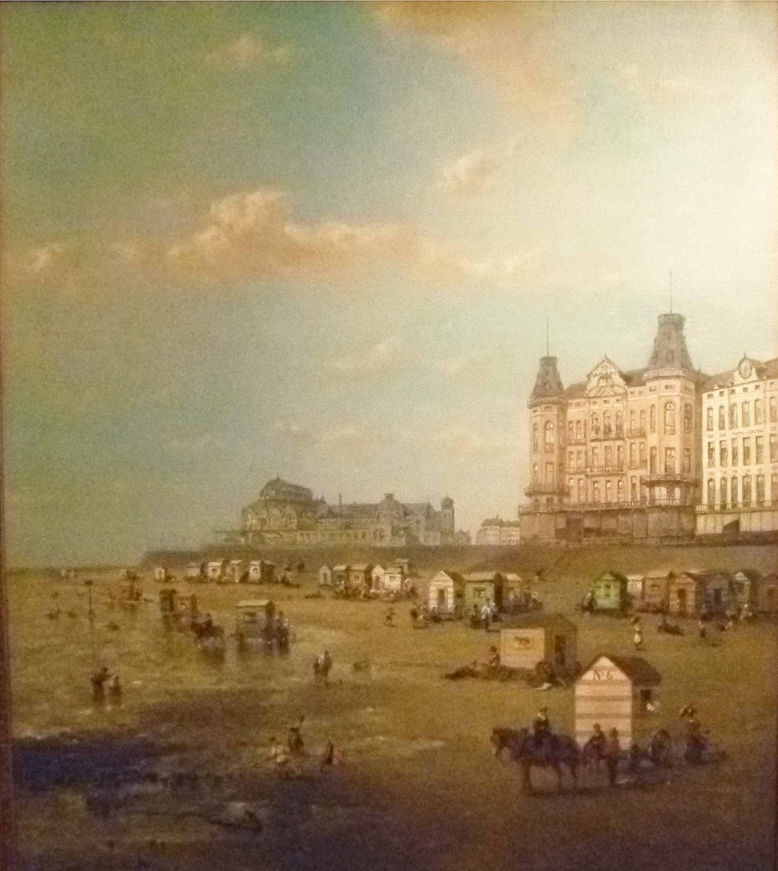 "Het weststrand en casino van Oostende" (ca. 1885); olieverf op doek door de Belgische kunstschilder François Musin (1820-1888); Collectie stad Oostende in MuZee